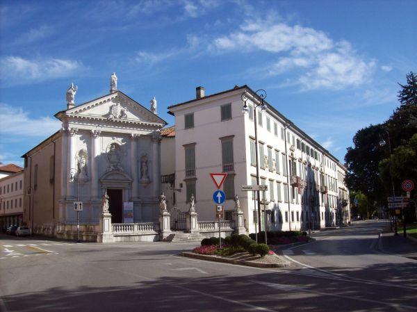 Udine (Friuli Venezia Giulia-Italy) - Palazzo Arcivescovile-Patriarcale e Chiesa di Sant'Antonio